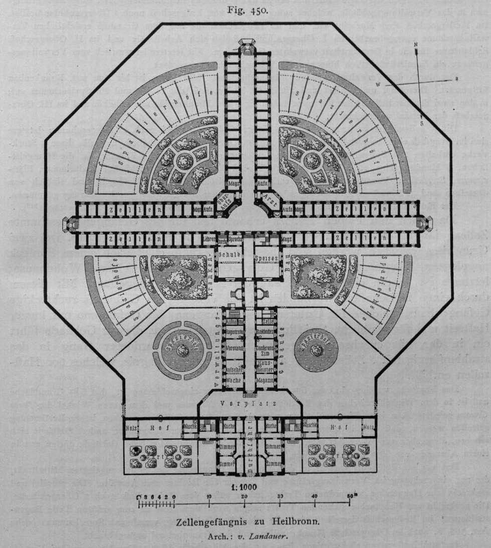 Heilbronner Zellengefängnis, 1873. Architekt: Theodor Wilhelm Landauer.